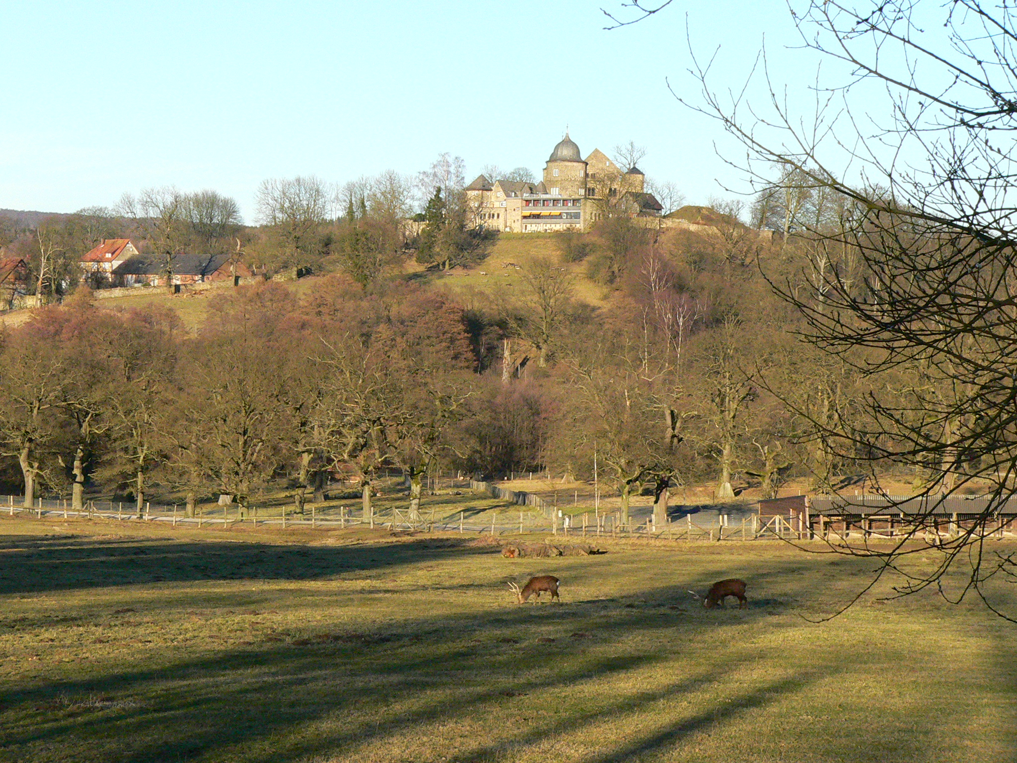 Im Tierpark Sababurg im Reinhardswald (Hessen)